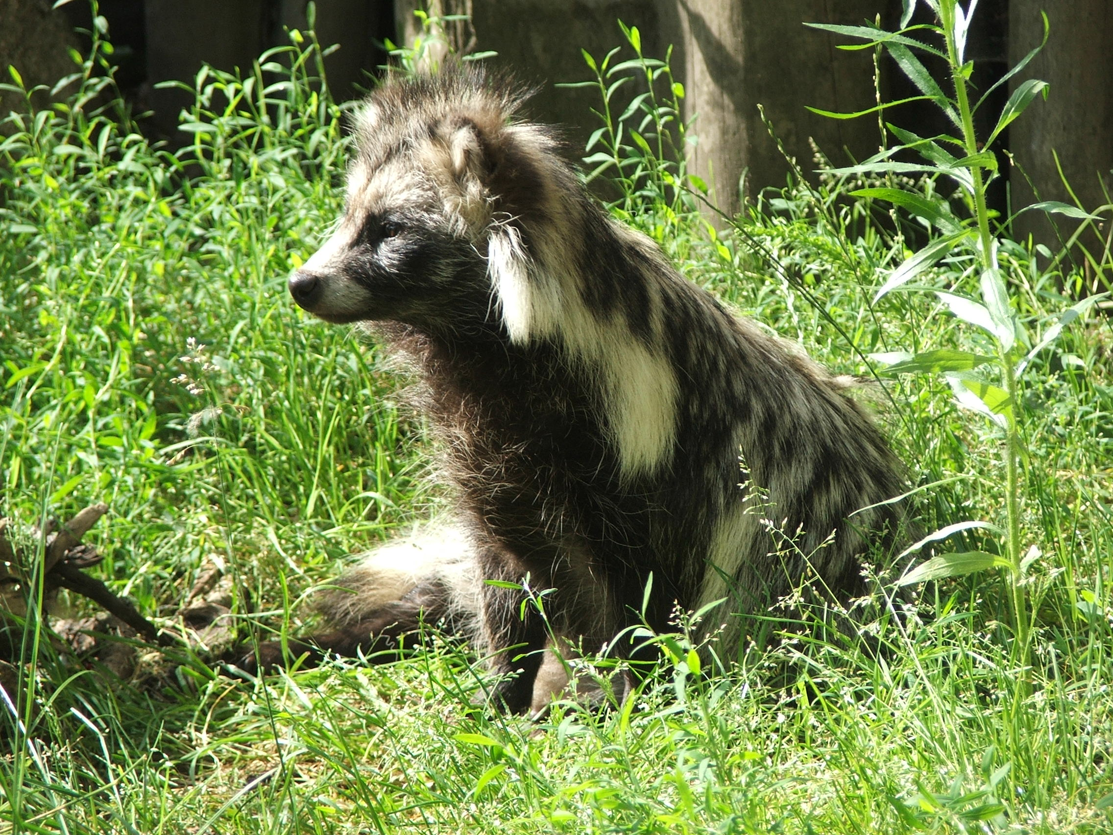 Nyctereutes procyonoides (ZOO in Ueckermünde)